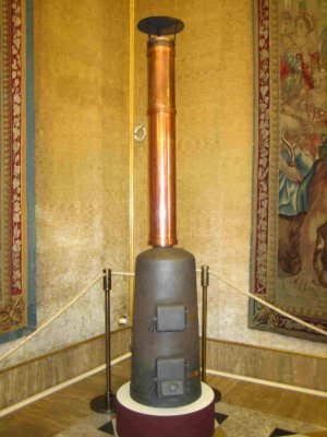 incinerador e chaminé utilizada na capela sistina no comclave de 2005